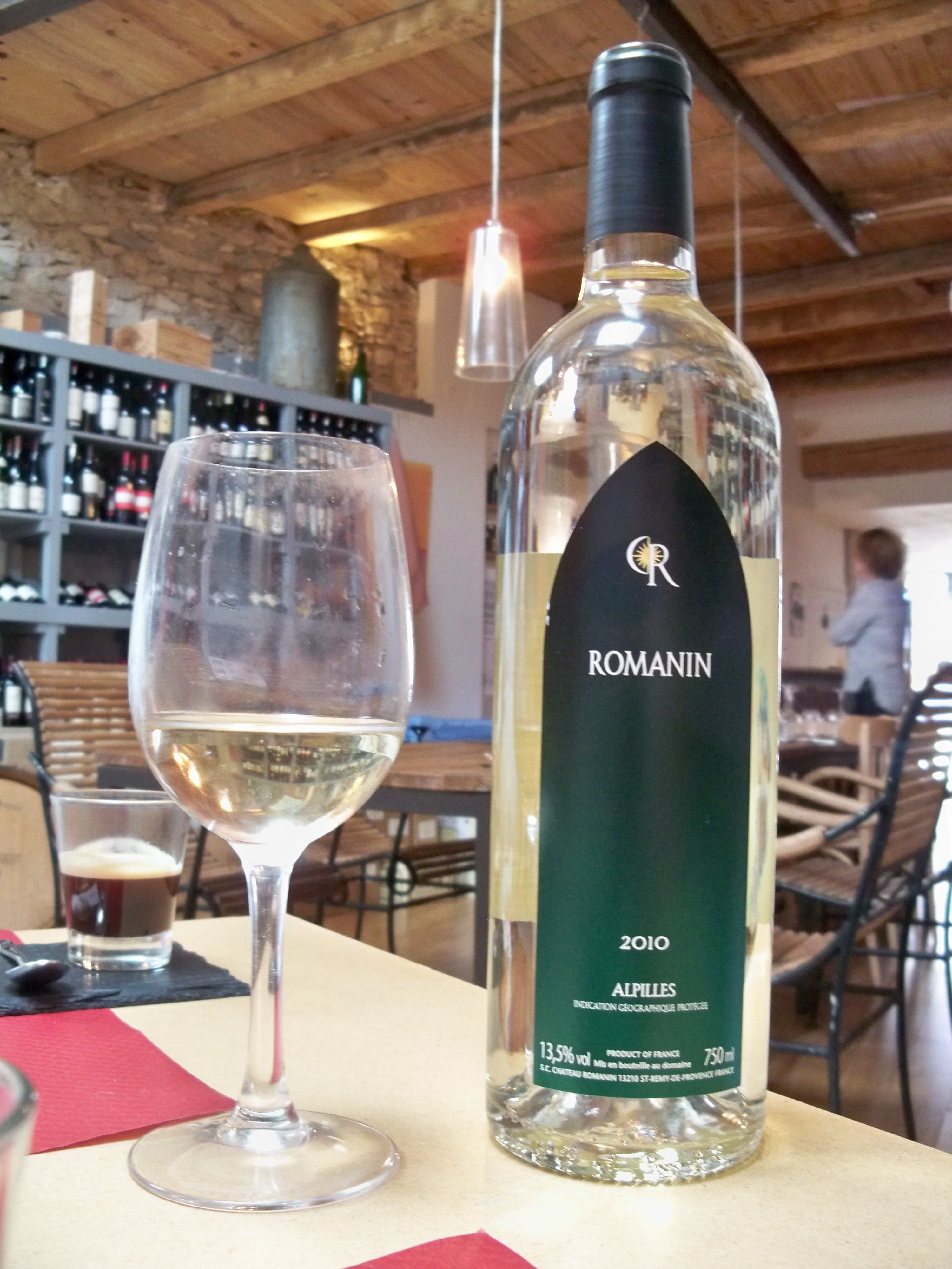 Bouteille de Vins des Alpilles Blanc